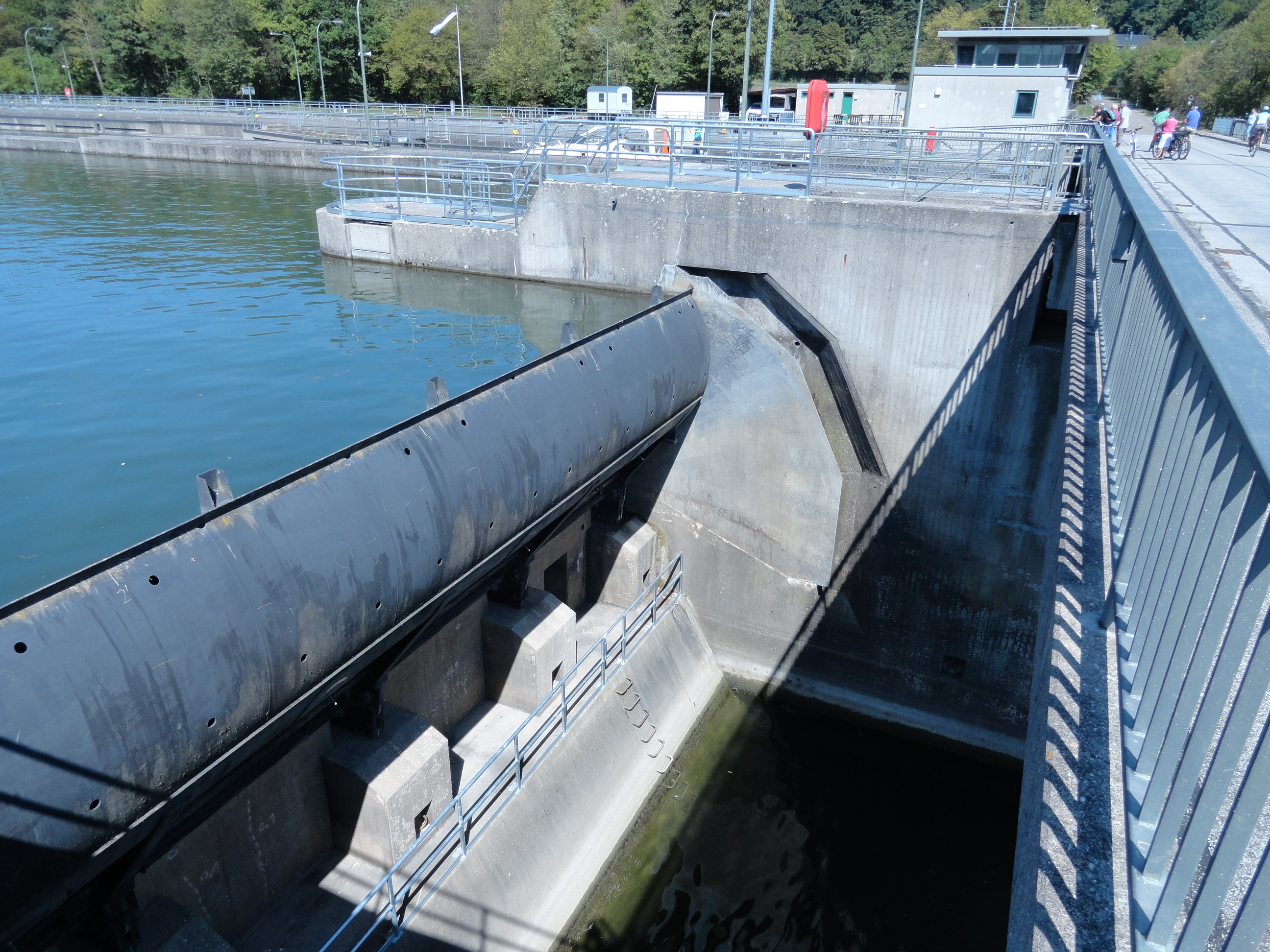 Staustufe Kelheim; linkes Wehrfeld